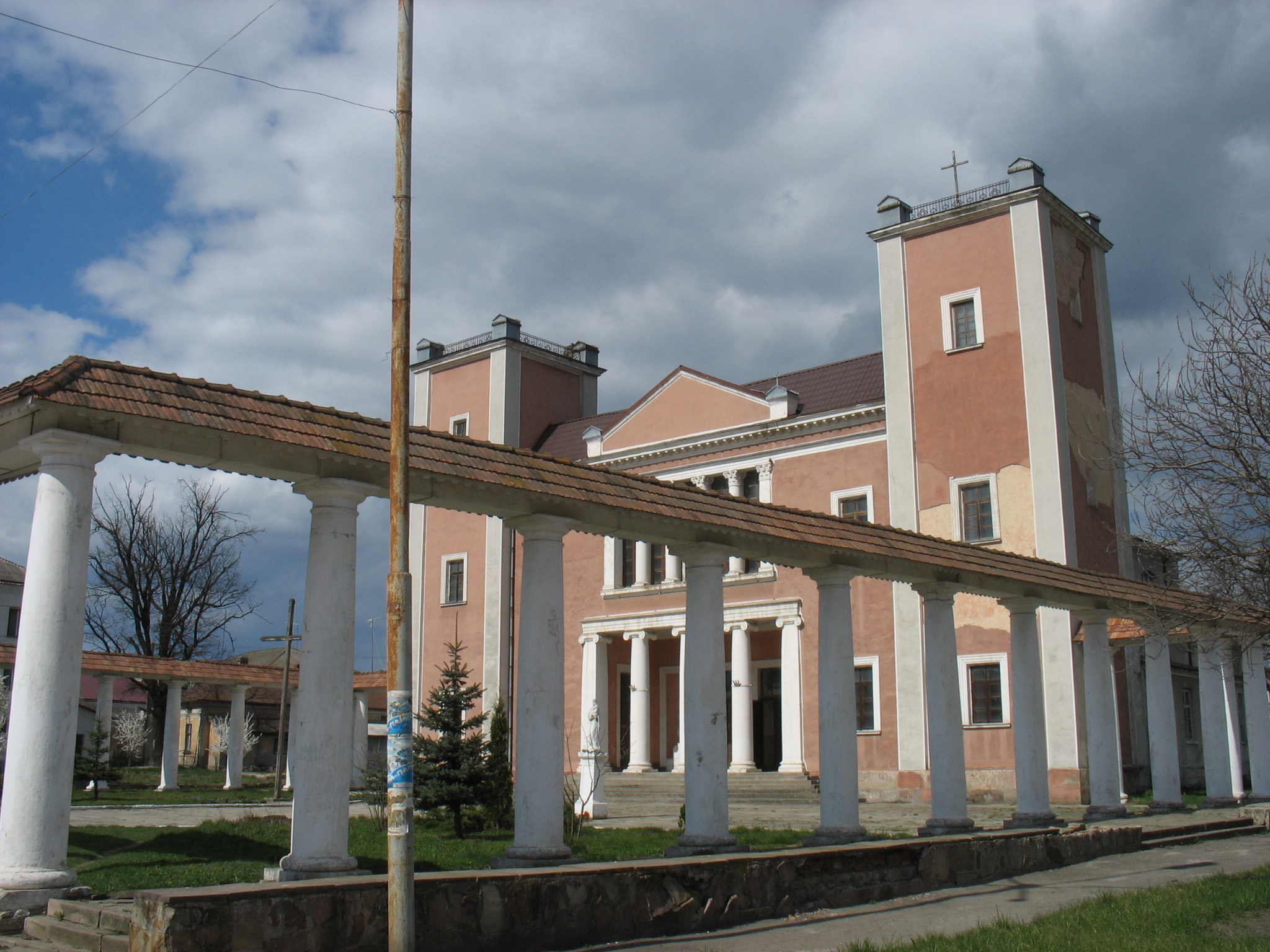 Теребовля, костел